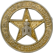 Insigne de la 5e Compagnie de transports gros porteurs en Algérie